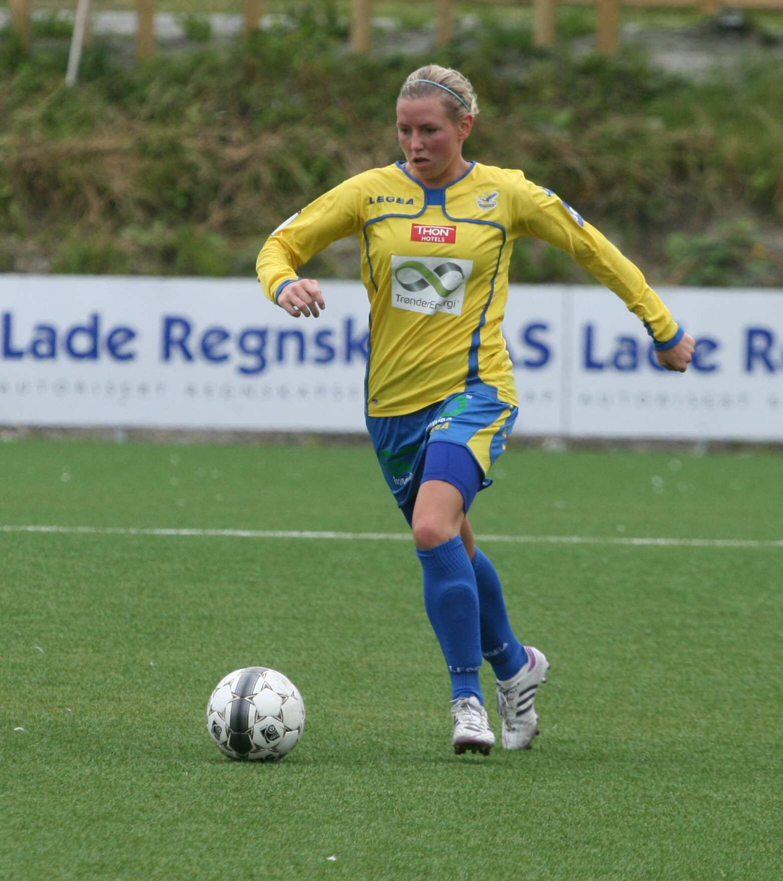 Fotballspilleren Hege Nordvik